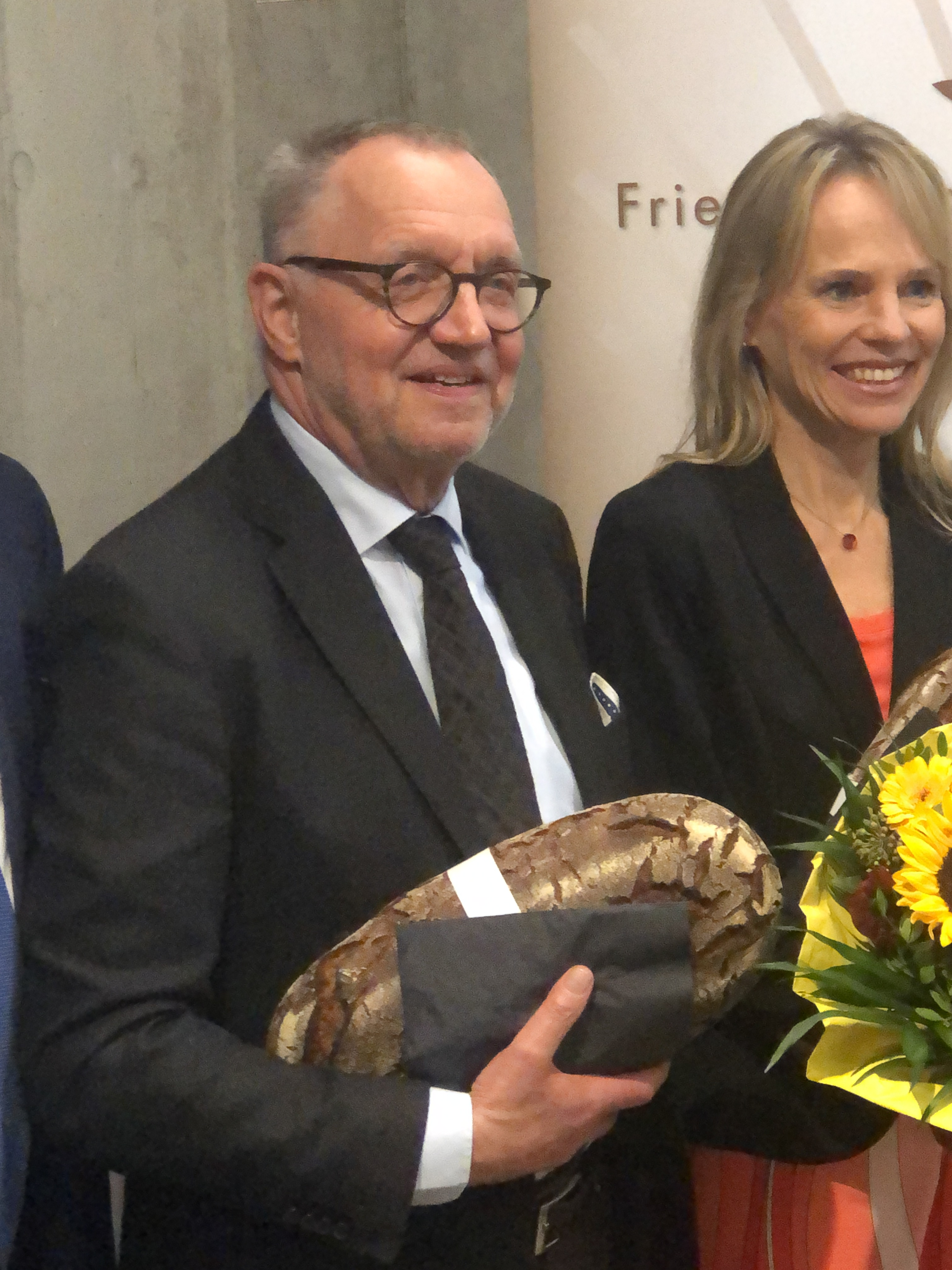 Gerd Sonnleitner und Catarina Zanner, RBB-Moderatorin